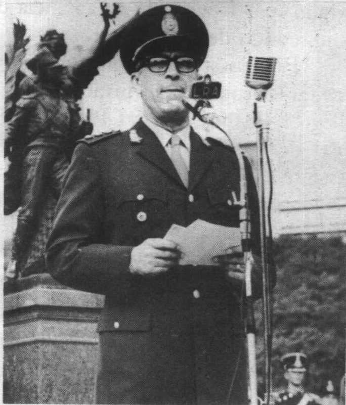 Teniente General Pascual Angel Pistarini